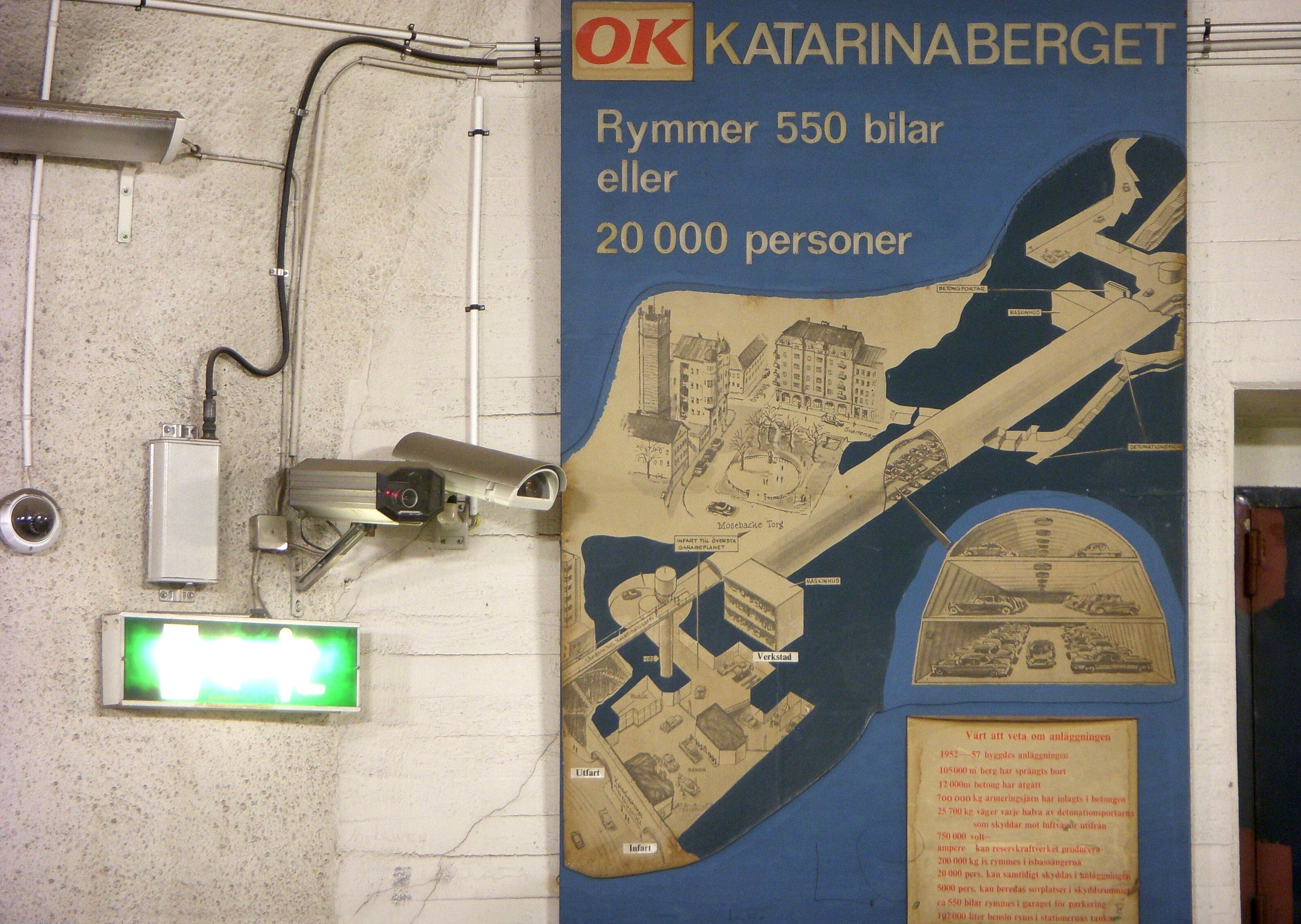 Katarinabergets skyddsrum, informationstavla